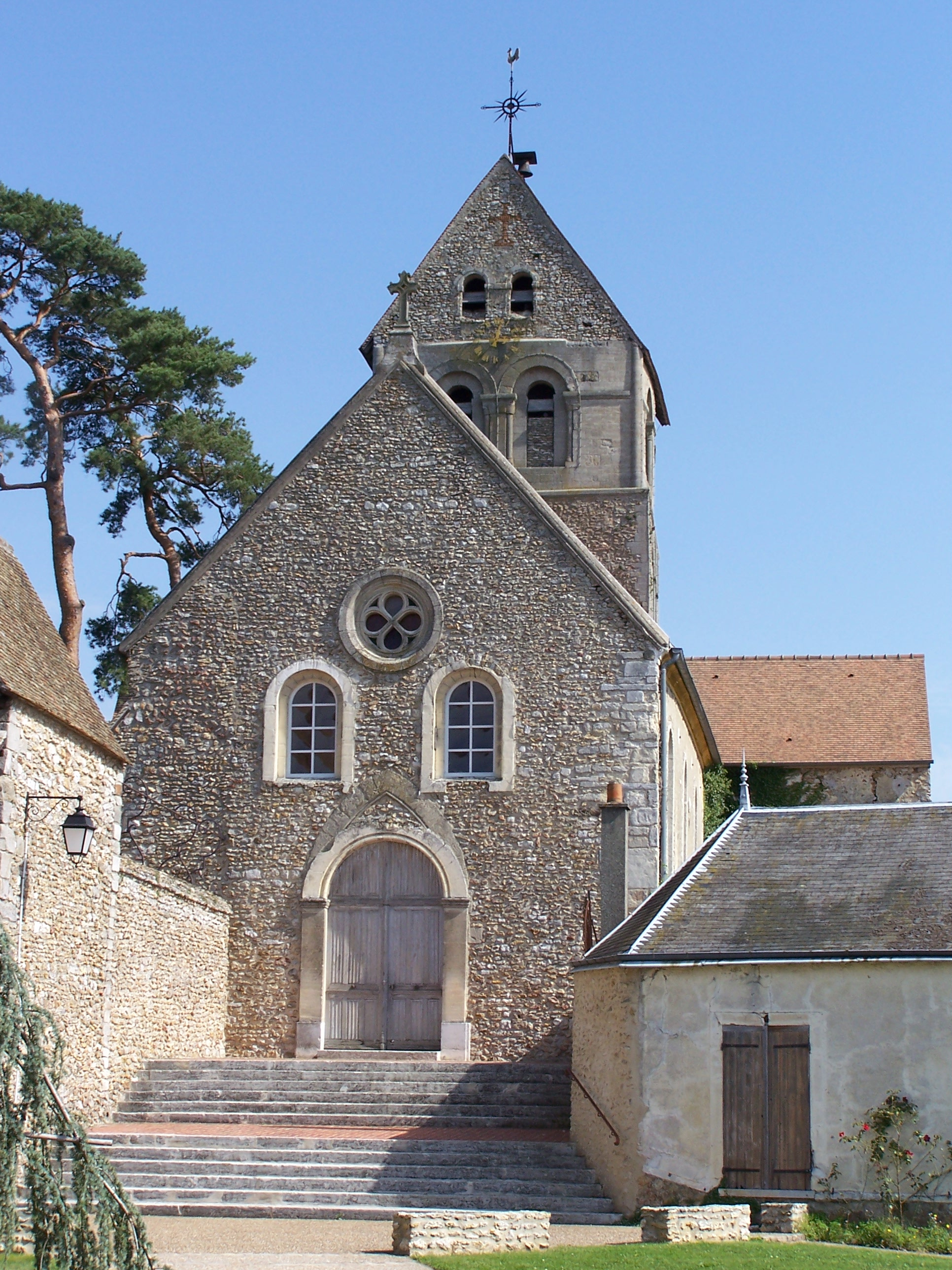 Église de Bazainville (Yvelines, France)